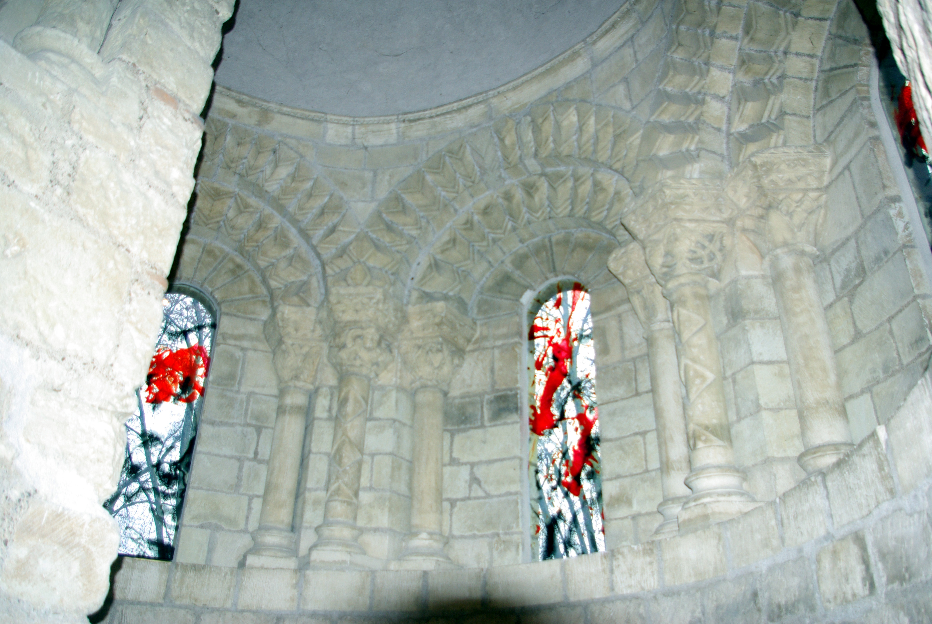 Prieuré de Saint-Cosme : Chaire du lecteur dont les vitraux sont l'œuvre de Zao Wou-Ki.